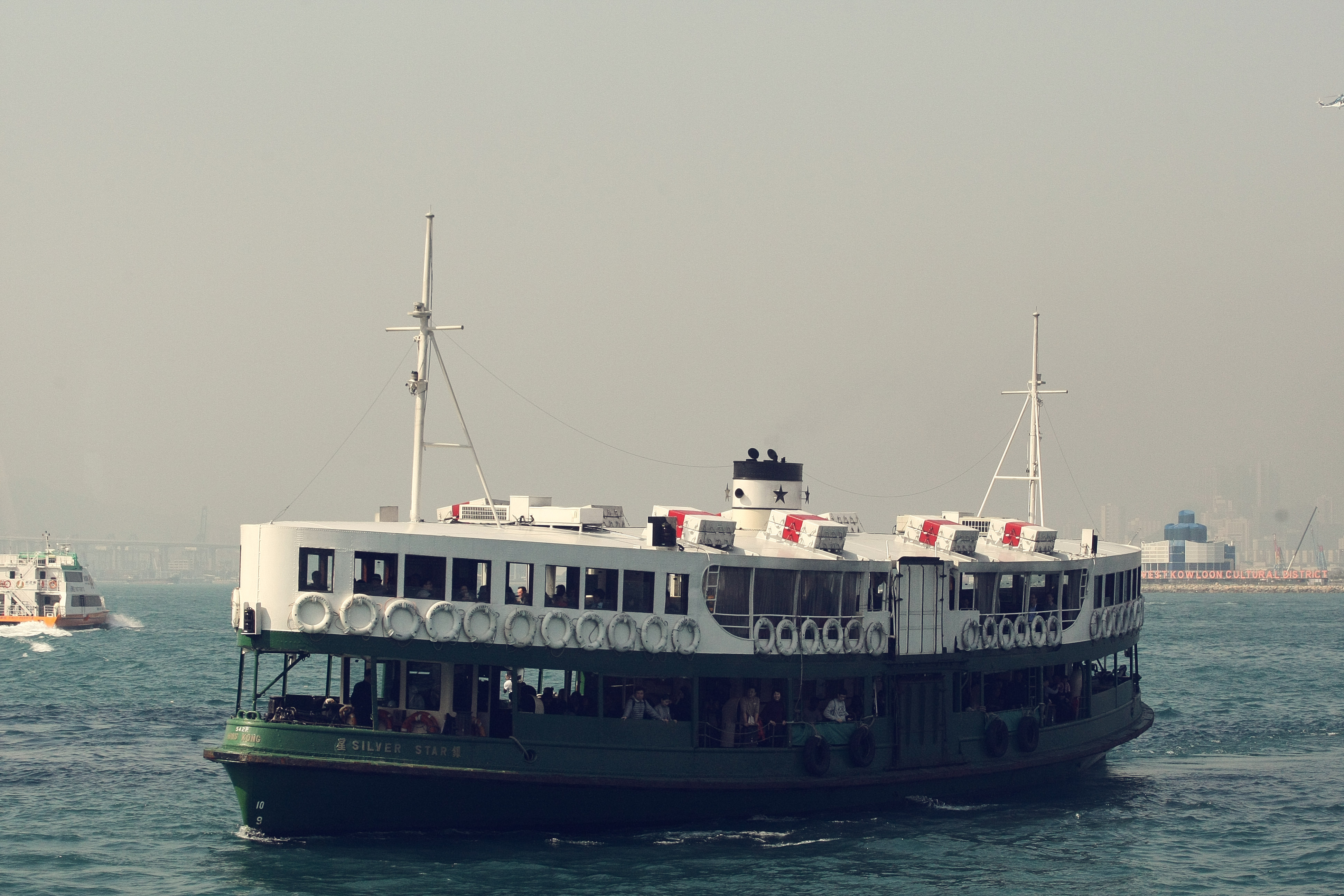 Star Ferry. Victoria Harbor. Hong Kong.